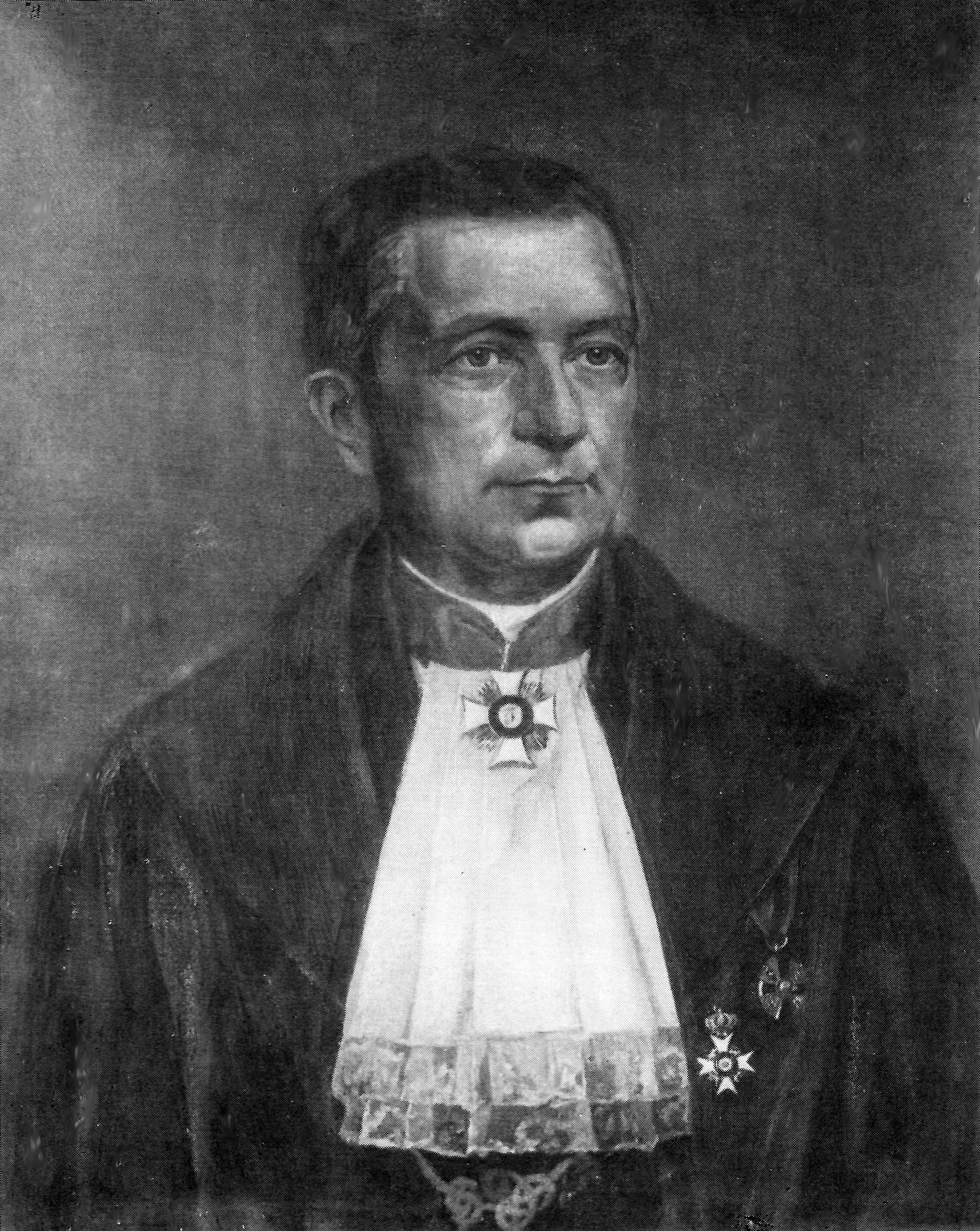 Portrait Karl von Vierodt